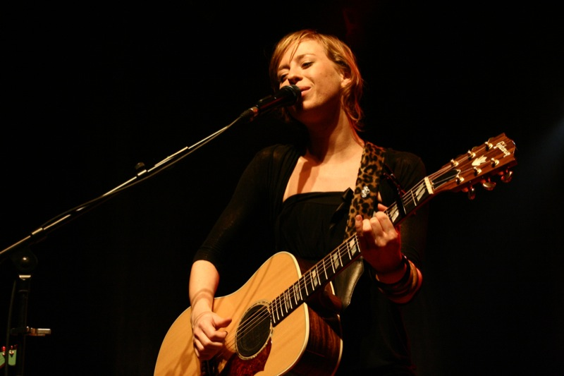 Stevie Ann